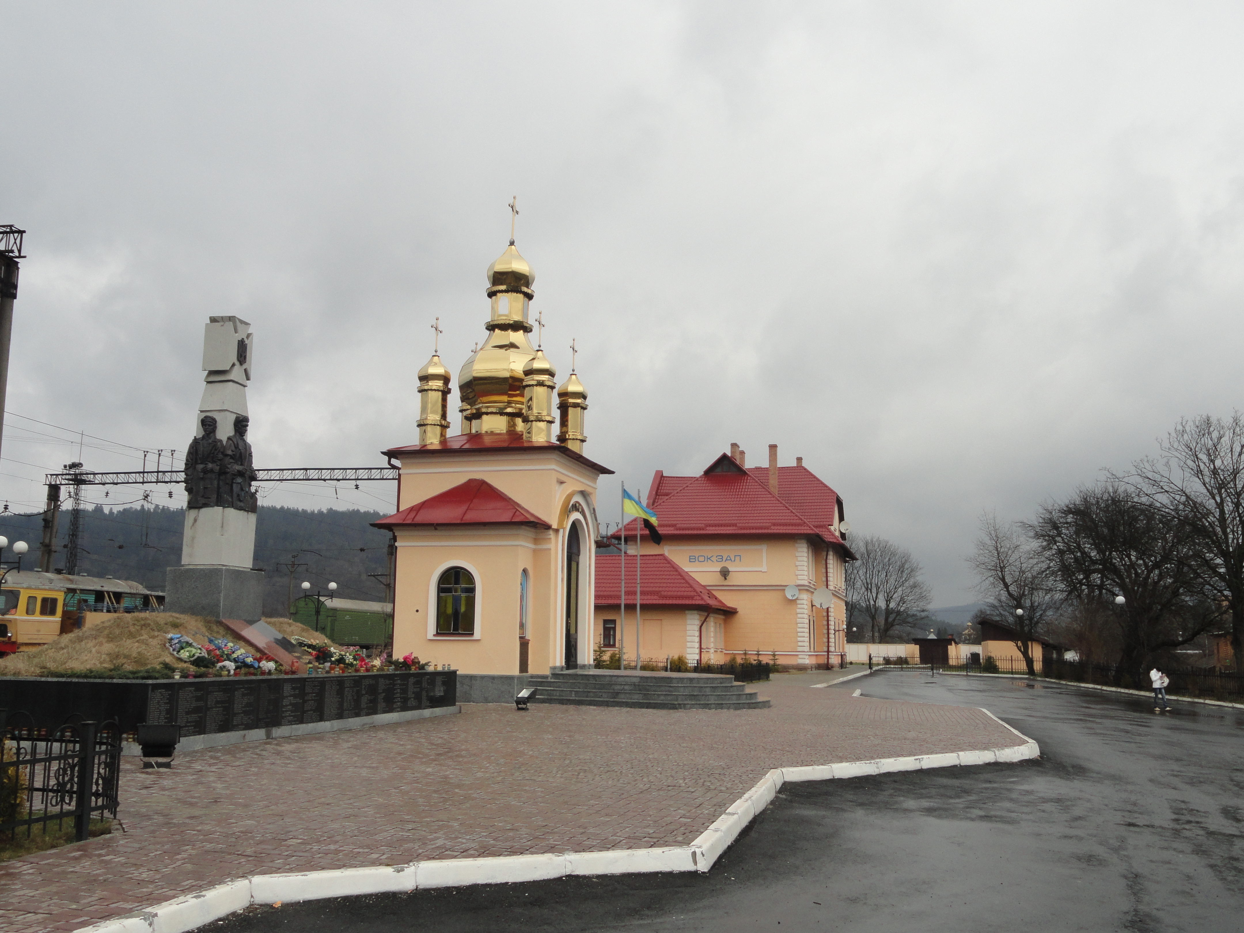 Железнодорожная станция с.Стрелки Турковского района Львовщина